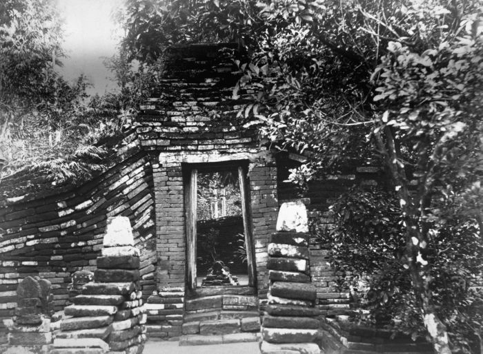 Foto. Makam "Putri Campa", seorang putri dari masa Majapahit